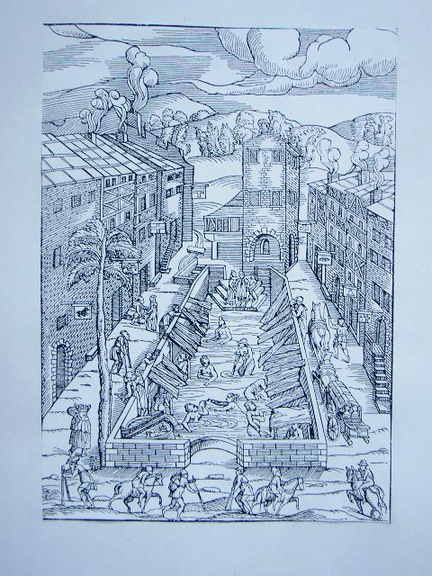 Das Heilbad France, Département des Vosges, Plombières im 16. Jahrhundert. Bâtiment thermal gallo-romain dit Piscine Jutier (vestiges) , en sous-sol de la rue Stanislas, et en regard de la parcelle AB 8 : classement par arrêté du 11 août 1980